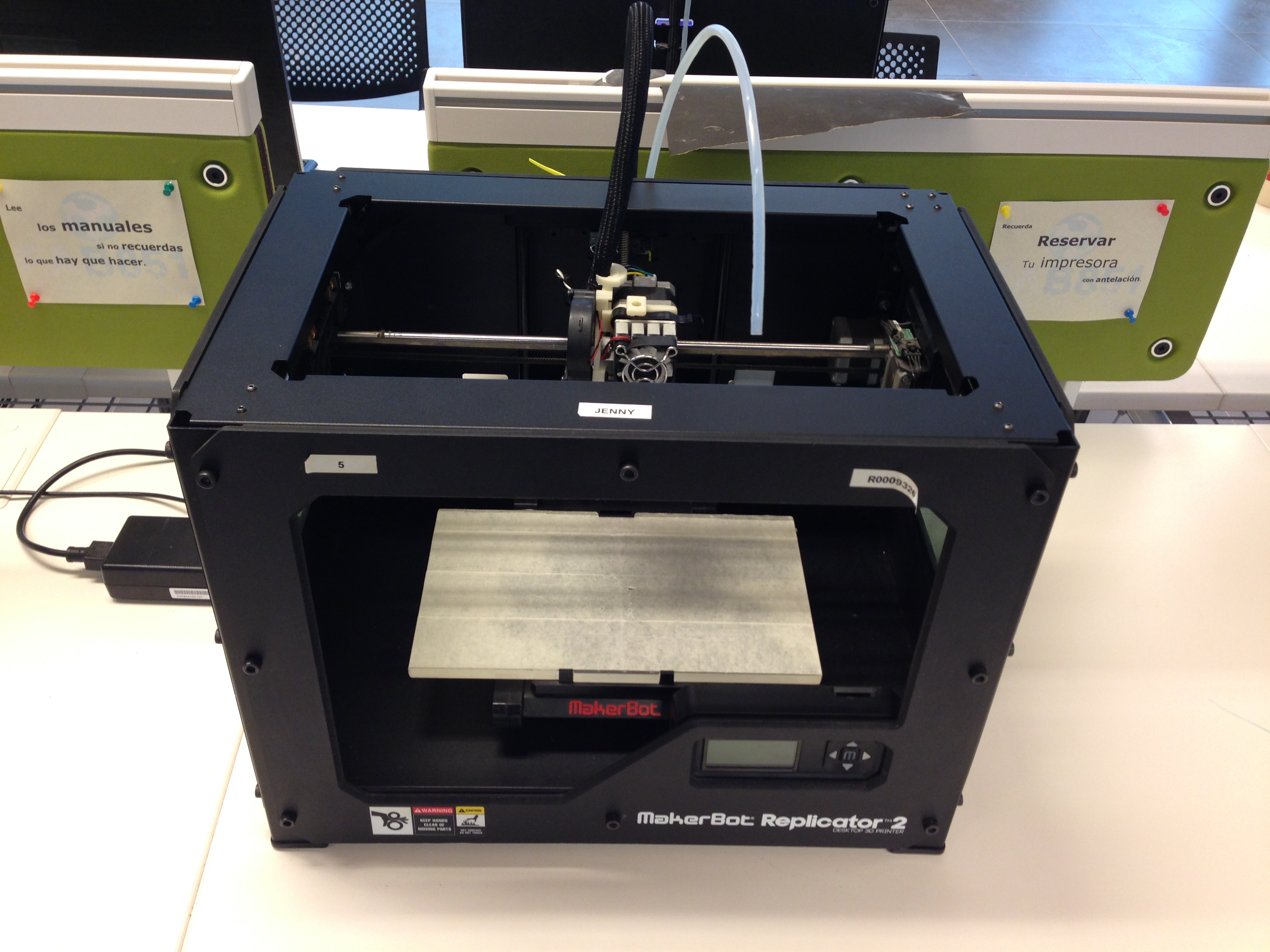 Máquina que permite imprimir con plásticos termo-plásticos como el PLA. Posee resolución de 0.25 mm aproximadamente.